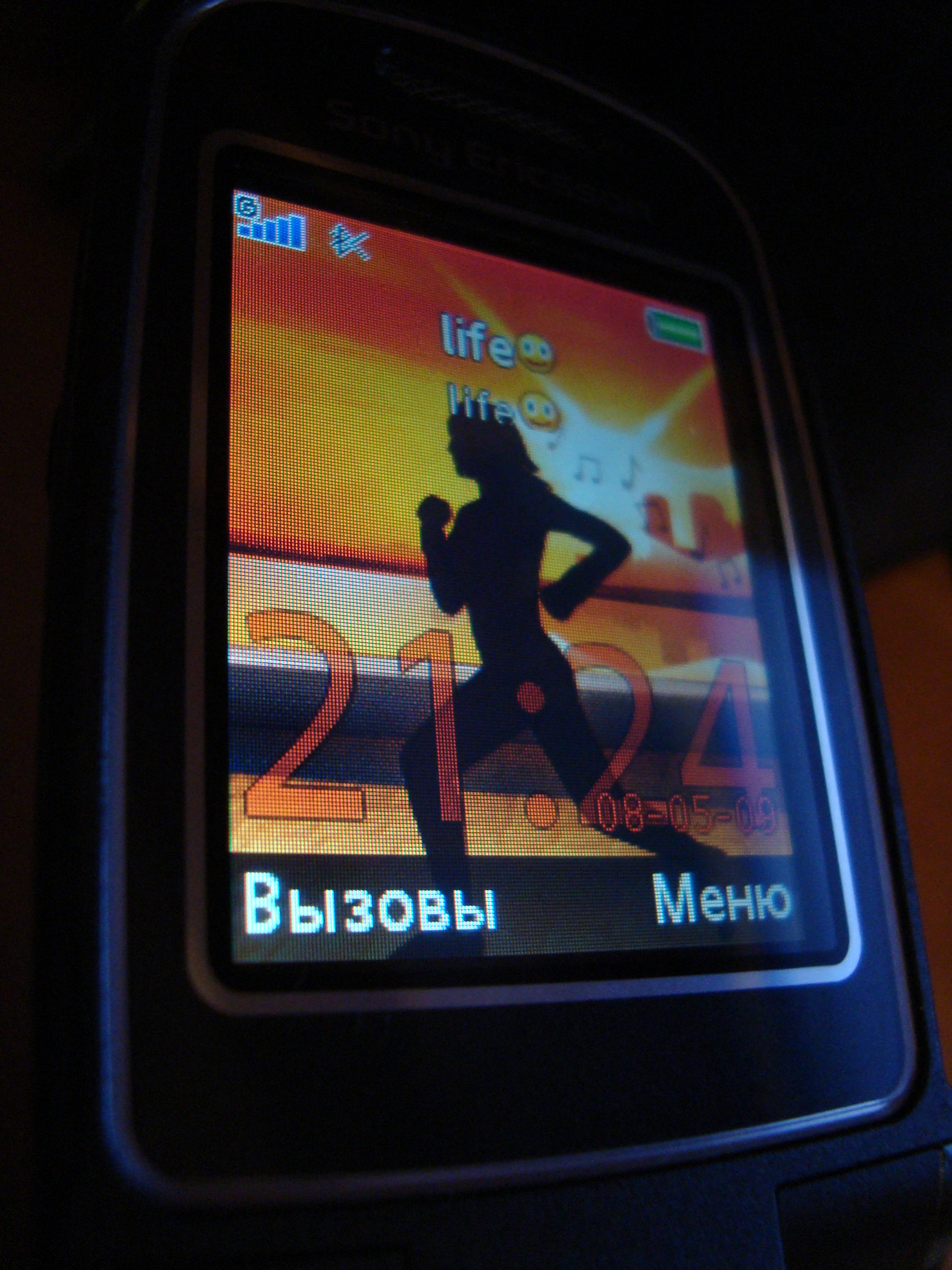 Дисплей телефона Z710i, фотографировал перед загрузкой (дата видна на экране телефона)